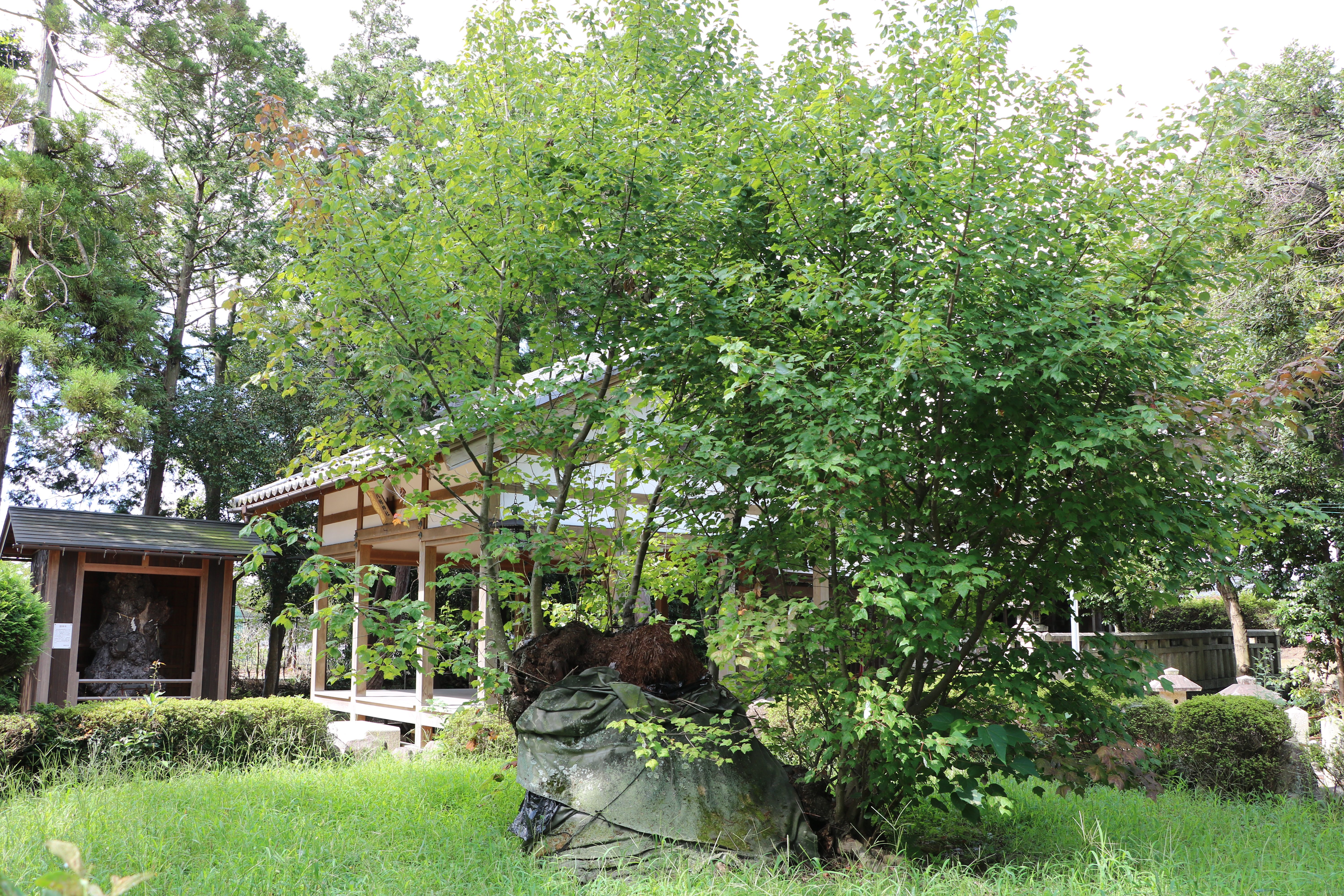 南花沢のハナノキ（国指定天然記念物、滋賀県東近江市）